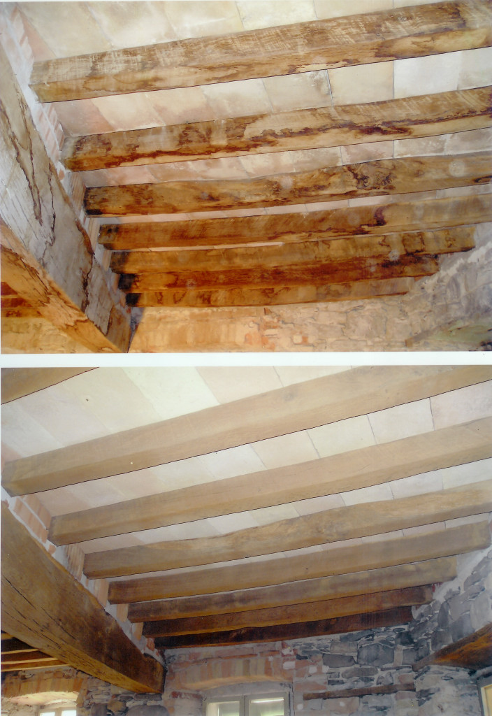 comparazione di un soffitto in travetti e pianelle puliti con sabbiatura ad acqua (sopra) ed a secco (sotto).